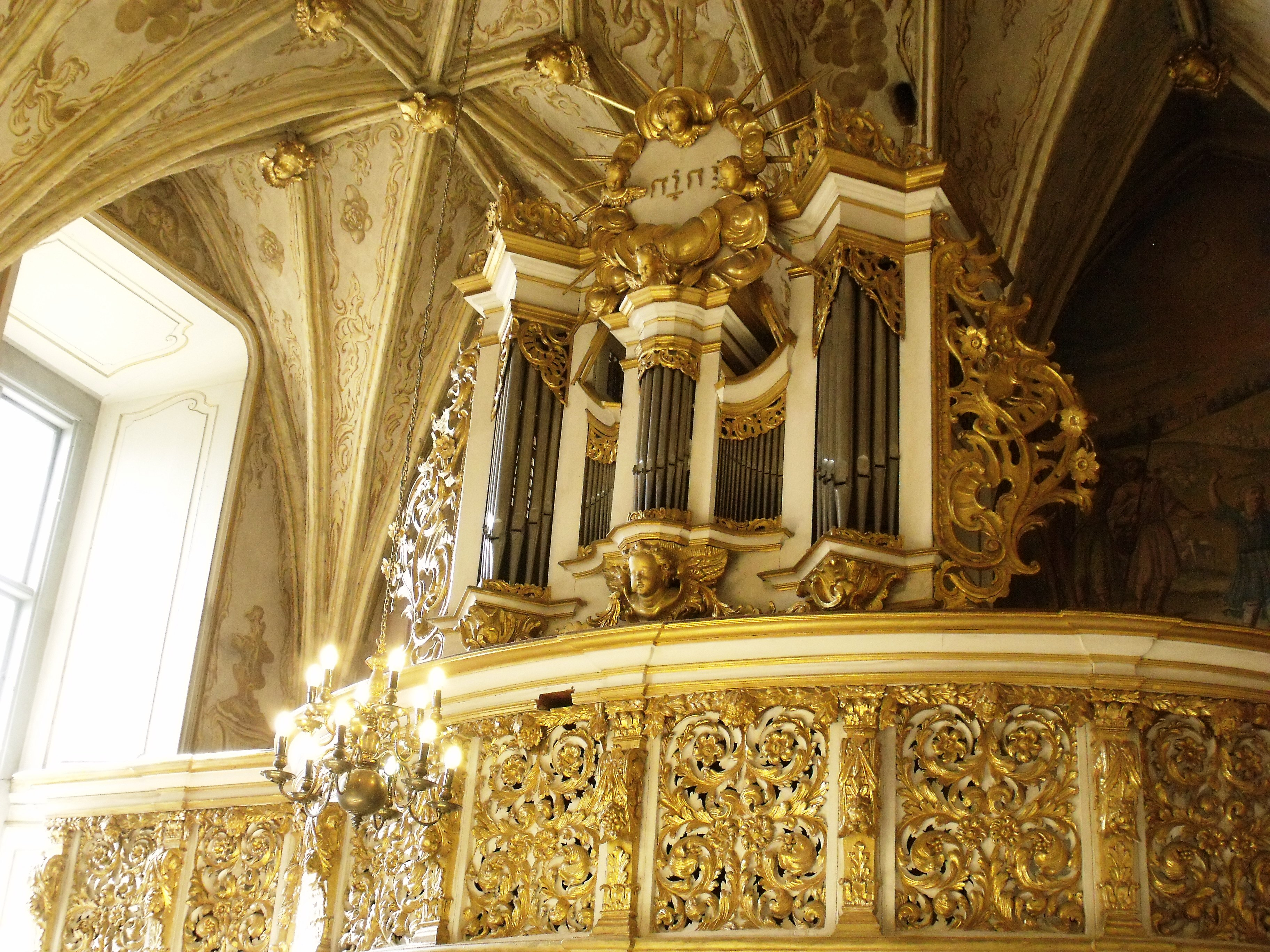 Lidzbark Warmiński, ul. Bartoszycka - kaplica zamkowa pw. św. Katarzyny, XVIII, XIX w. (zabytek nr A-440 i 477 [L/94] z 17.12.1957)